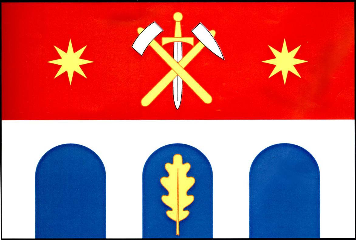 Vlajka obce Jezdovice